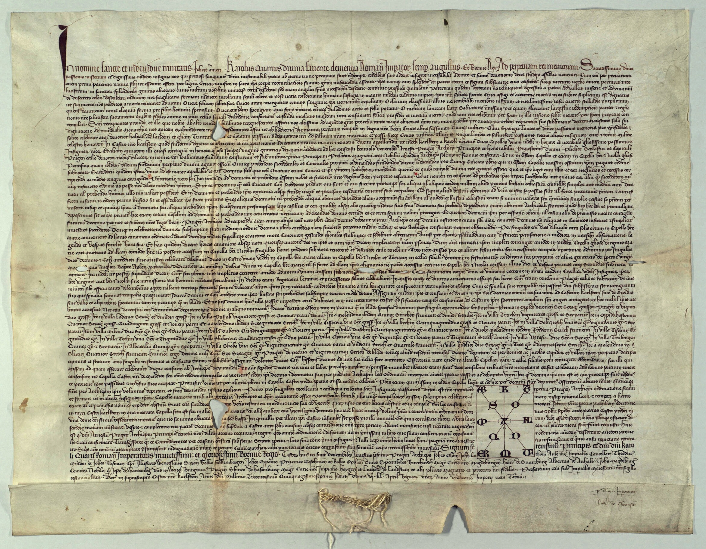 Zakládací listina kapituly karlštejnské, pergamenový originál z 27. 3. 1357